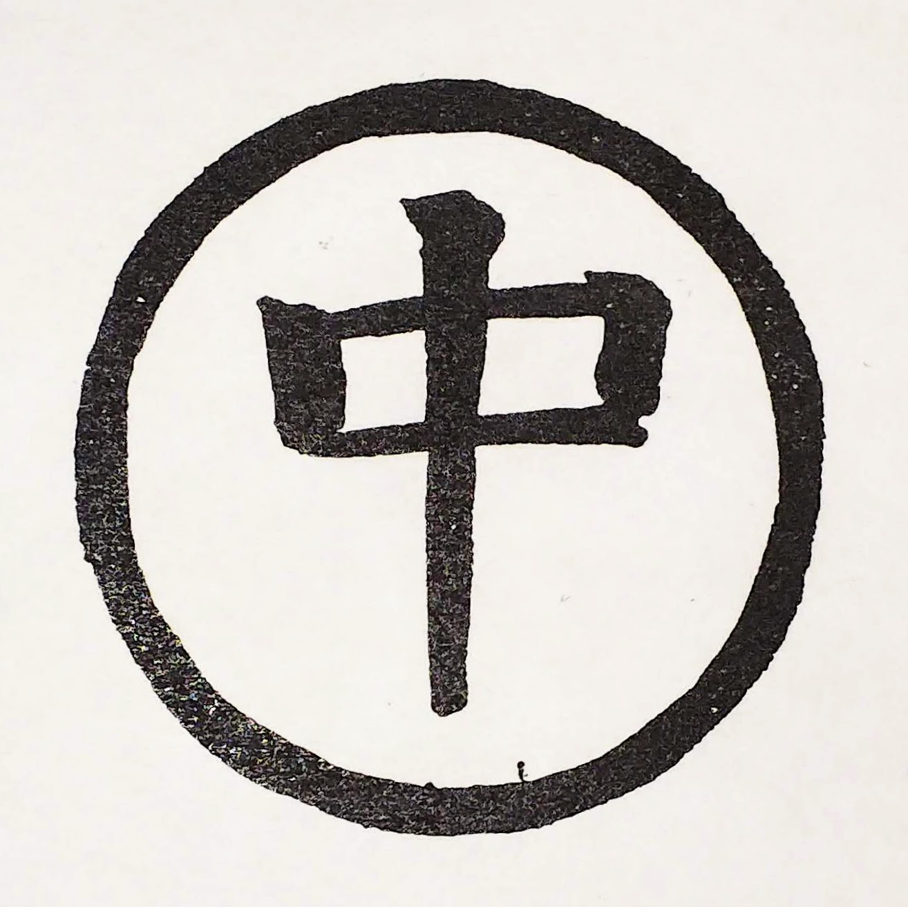 中書島 遊廓 紋章